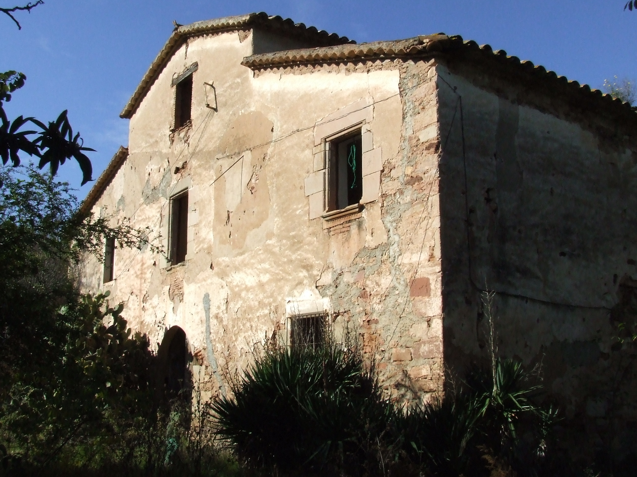 Can Granada (Bigues, Bigues i Riells, Vallès Oriental)